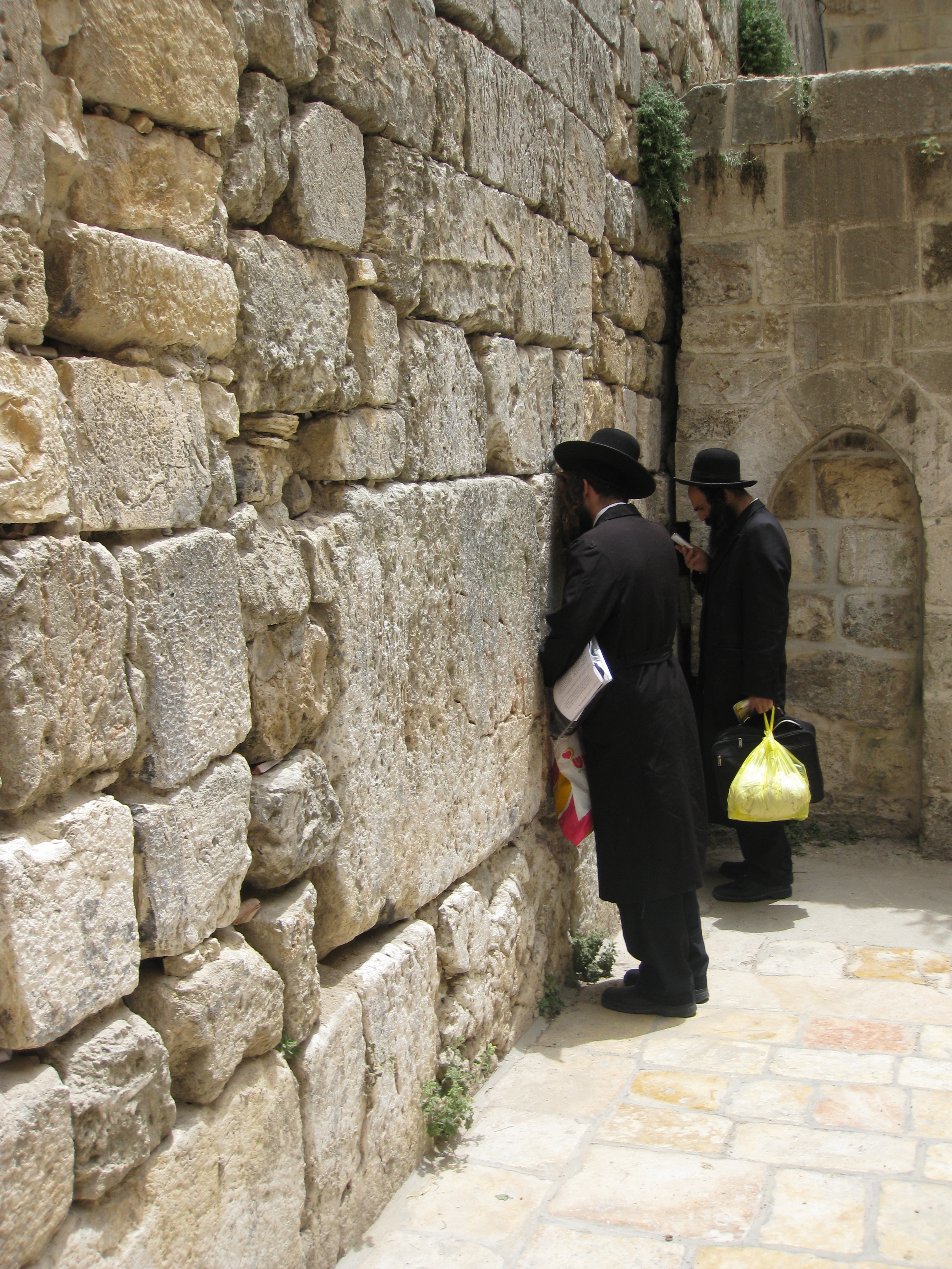 Muslim Quarter הרובע המוסלמי בירושלים הכותל הקטן